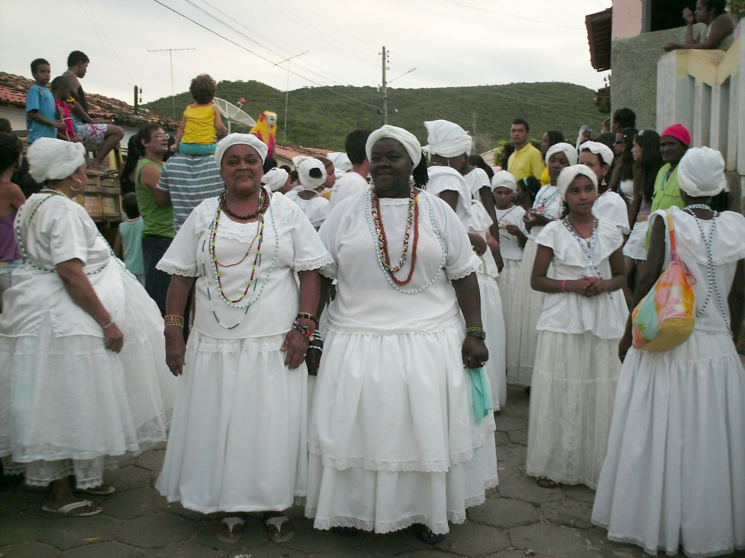 Baianas na Lavagem da Esquina do Padre, festa típica, folclore, Caetité, Bahia, Brazil